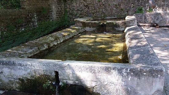 Fontana di canale presso il Comune di Latera